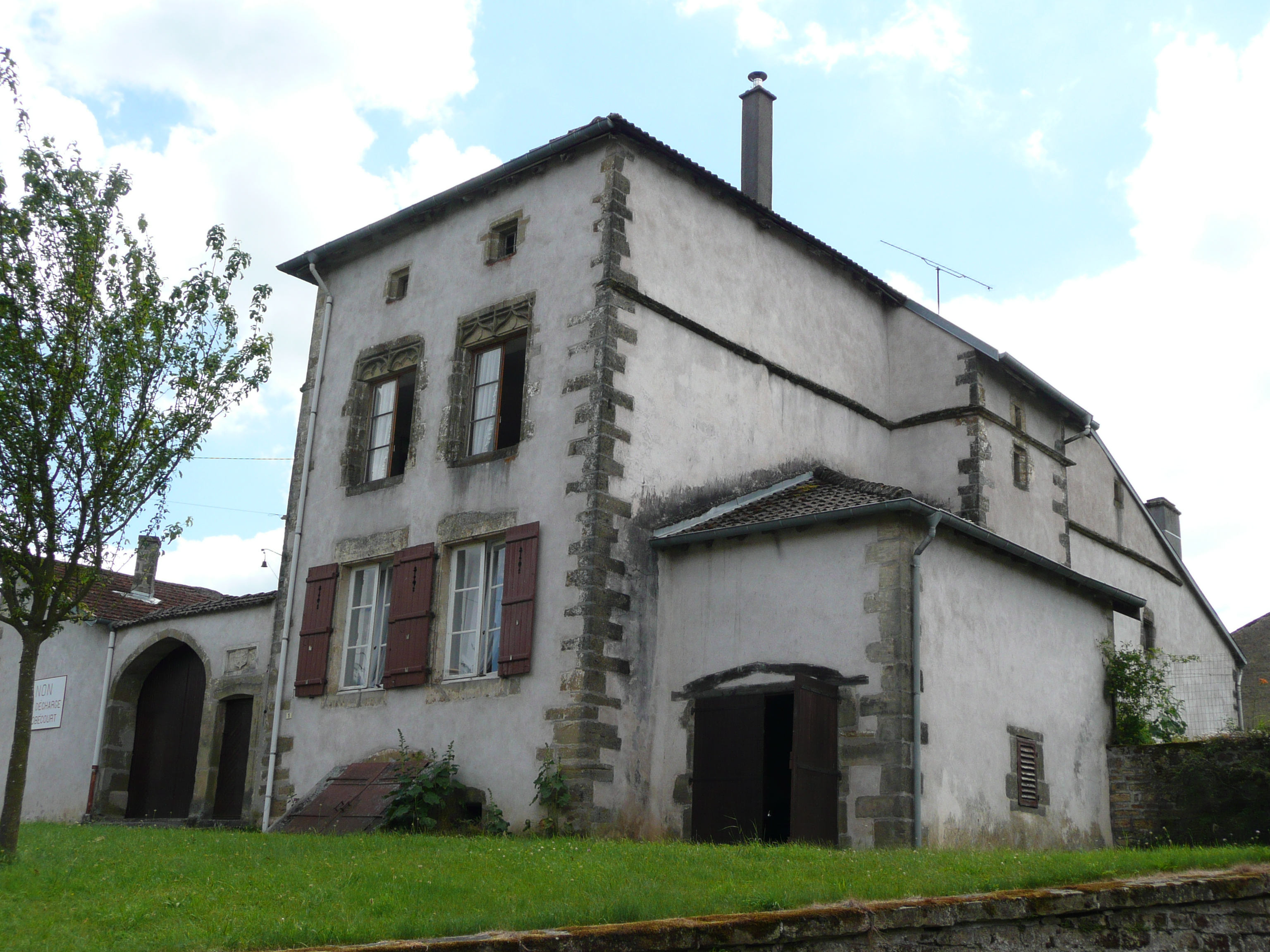 Ancien hôpital des Hospitaliers de Saint-Jean à Robécourt (Vosges)